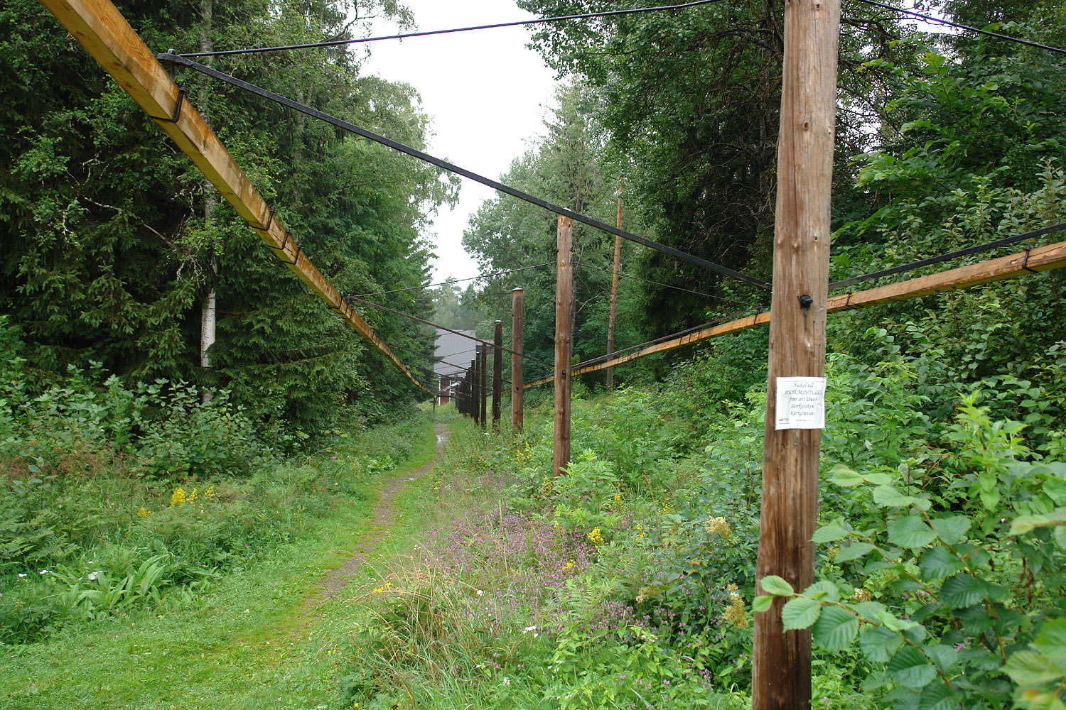 Das Polhemsrad (Polhemshjulet) ist ein Wasserrad, das in der schwedischen Bergwerksregion Bergslagen (nahe Norberg) von 1876 bis 1920 Teil eines Antriebsystems zur Entwässerung von Erzgruben war. Foto: erhaltener Teil der Zugstangen, Radhaus